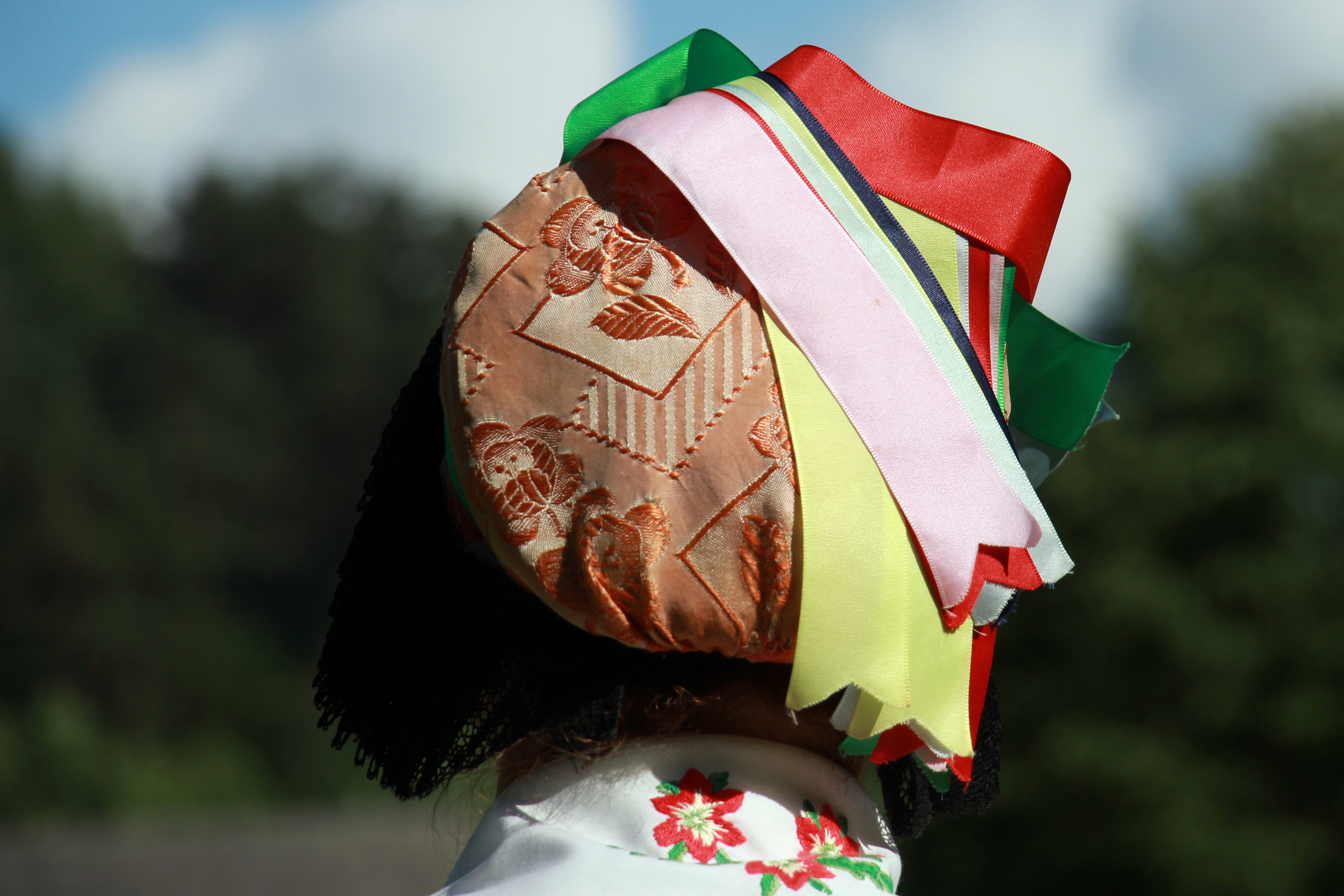 Czepiec do stroju kobiecego mniejszości niemieckiej z Chmielnicy. Fotografia wykonana w skansenie w Starej Lubowni